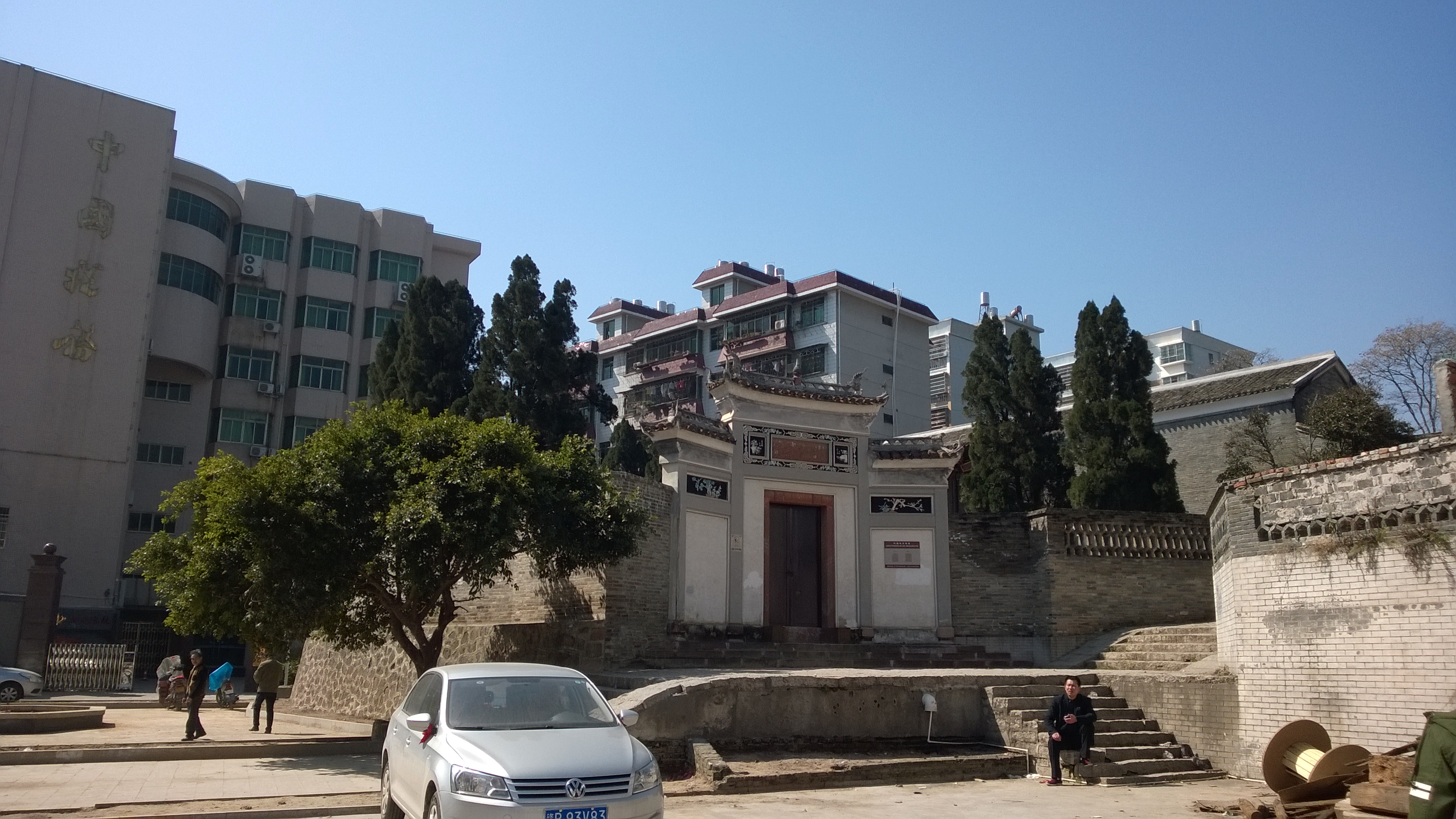 潋江书院大门